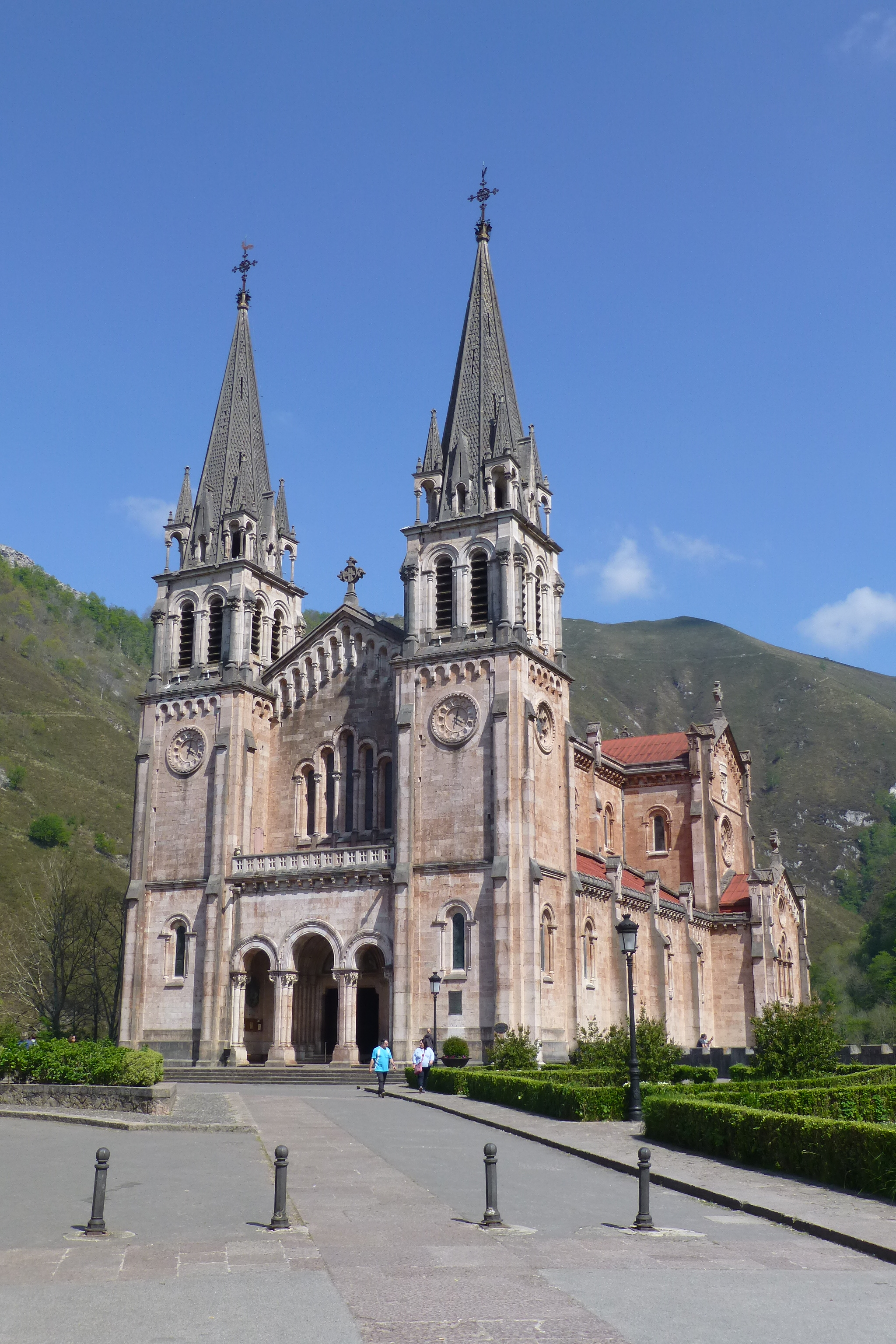 Vista general de la Basílica del santuario de Covadonga en Onis, Asturias (España)